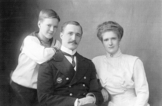 Князь Георгий Александрович (1898—1976), князь Александр Александрович (1881—1915) и княжна Елена Александровна (1889—1976) Щербатовы.